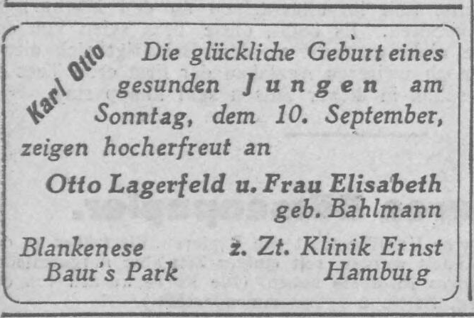 Geburtsanzeige von Karl Lagerfeld